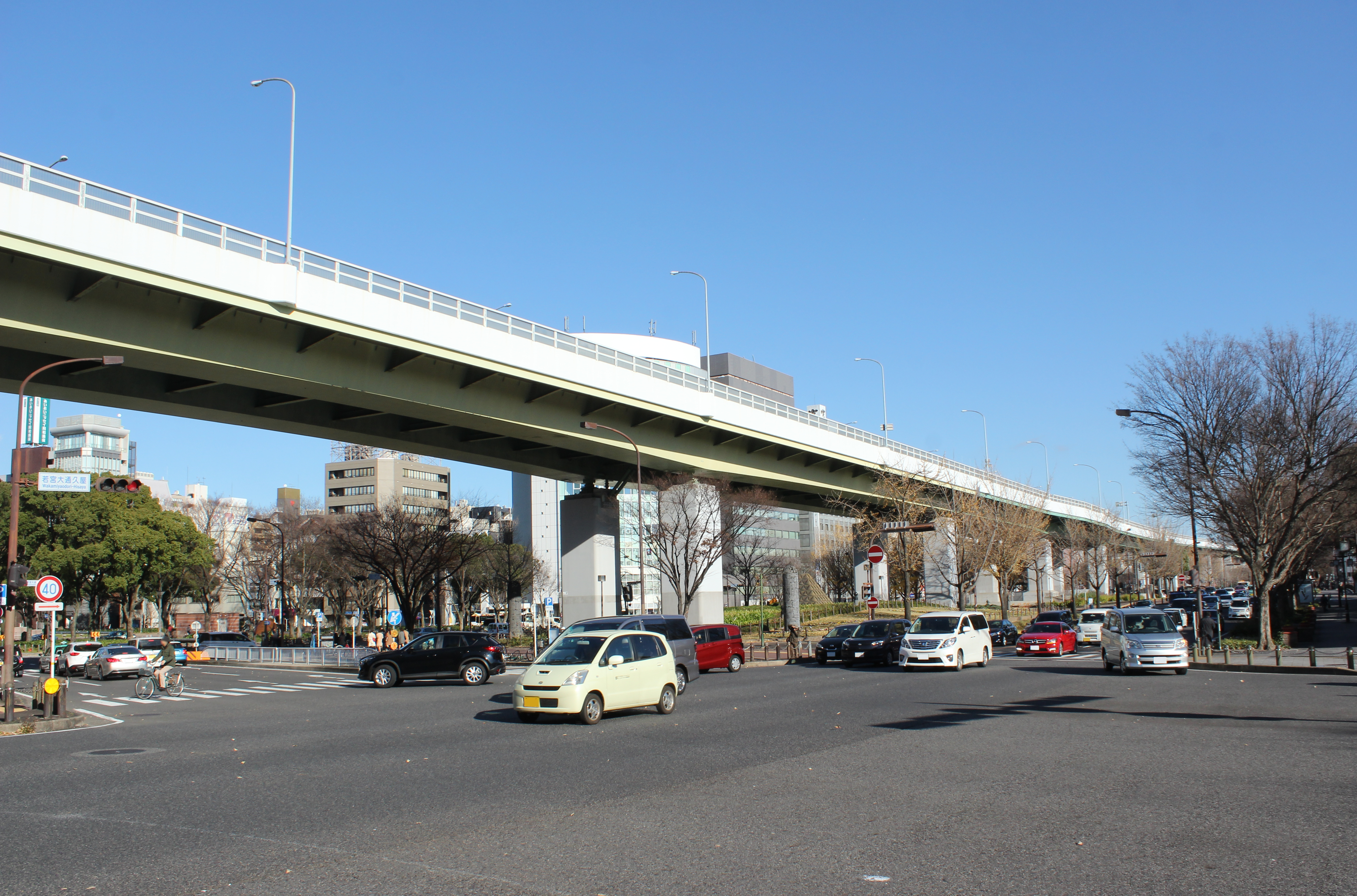 若宮大通と久屋大通の交点